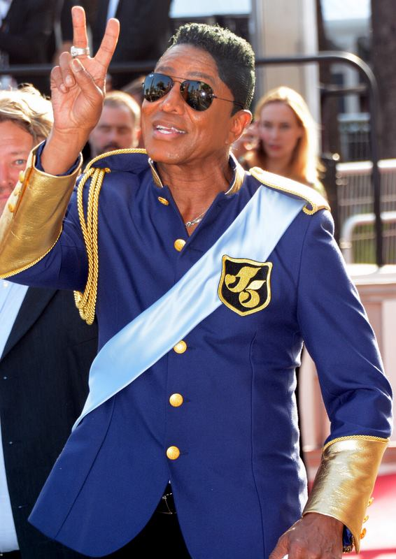 Jermaine Jackson au festival de Cannes